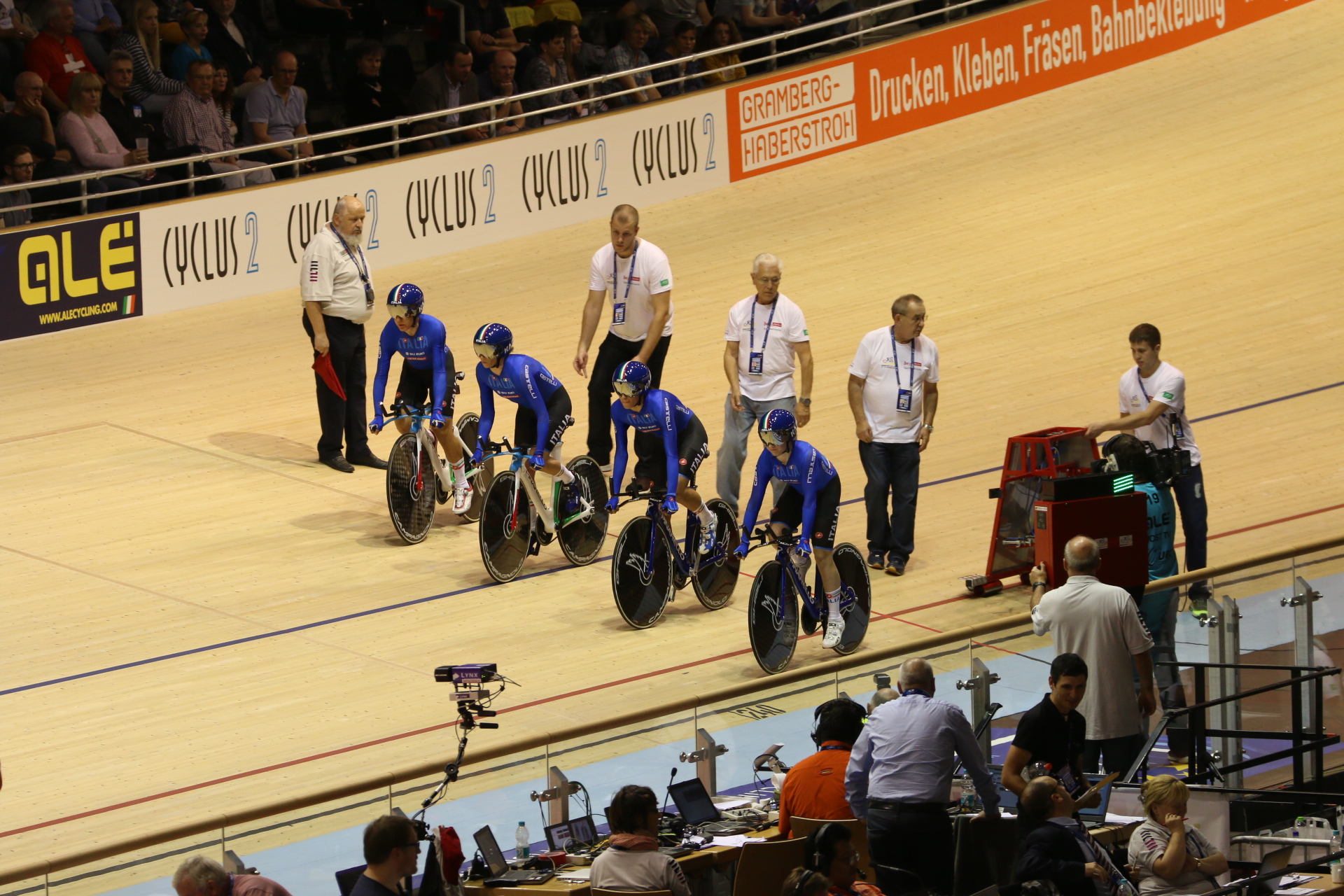 Start des ital. Frauen-Vierers